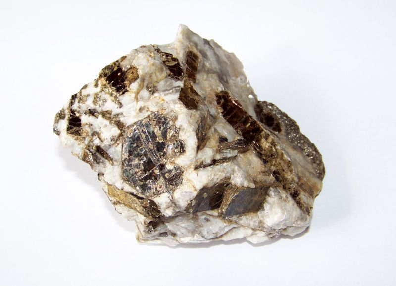 Pegmatyt anatektyczny z biotytem i muskowitem. Michałkowa, Góry Sowie, Dolny Śląsk,Polska.